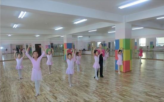 Монгол: Шинэ Монгол сургуулийн сурах орчины талаарх мэдээлэлд хавсралт болгох зорилгоор нийтлэв.